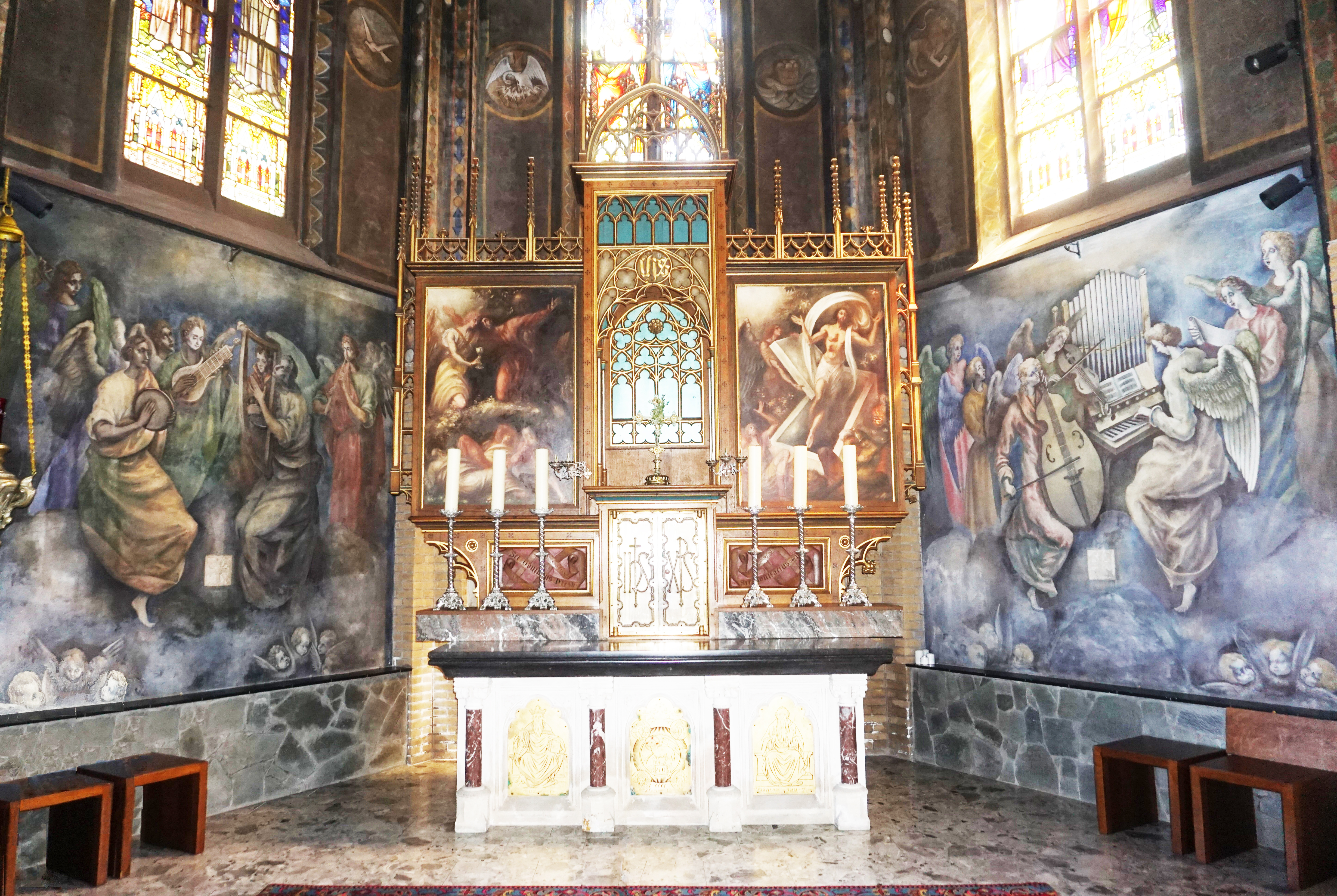 Priesterkoor Odulphuskerk, Bakhuizen